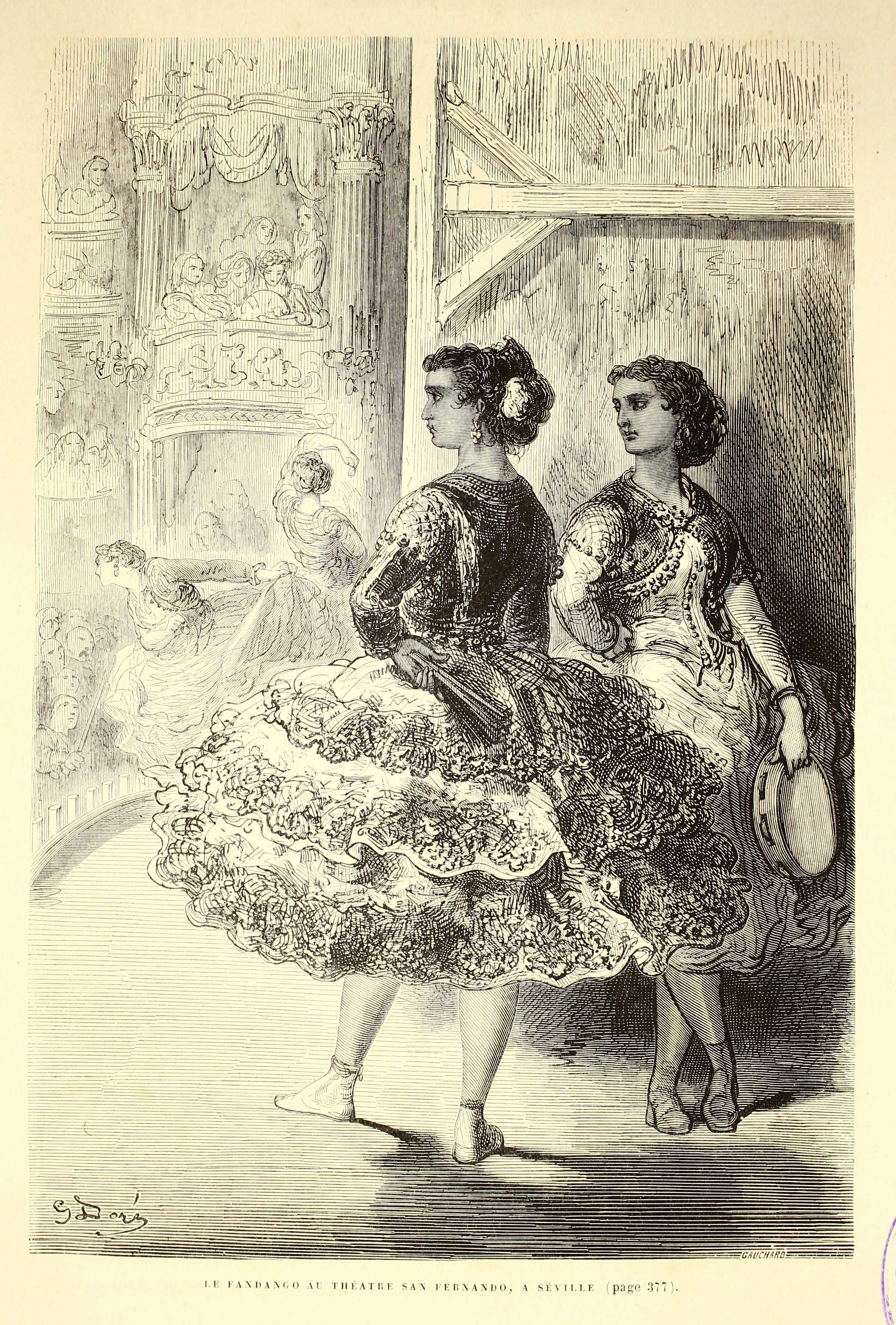 Autor: Davillier, Jean Charles, barón, 1823-1883 Descripción bibliográfica: L'Espagne / par Le Baron CH. Davillier ; ilustrée de 309 gravures dessinées su bois par Gustave Doré. - Paris : Librairie Hachette, 1874. - 799 p. : il. Materia: España- Geografía Materia: España- Usos y costumbres Ilustrador: Doré, Gustave, 1832-1883 Editor: Libreria Hachette Lugar de impresión: Francia, París Localización: Libro completo